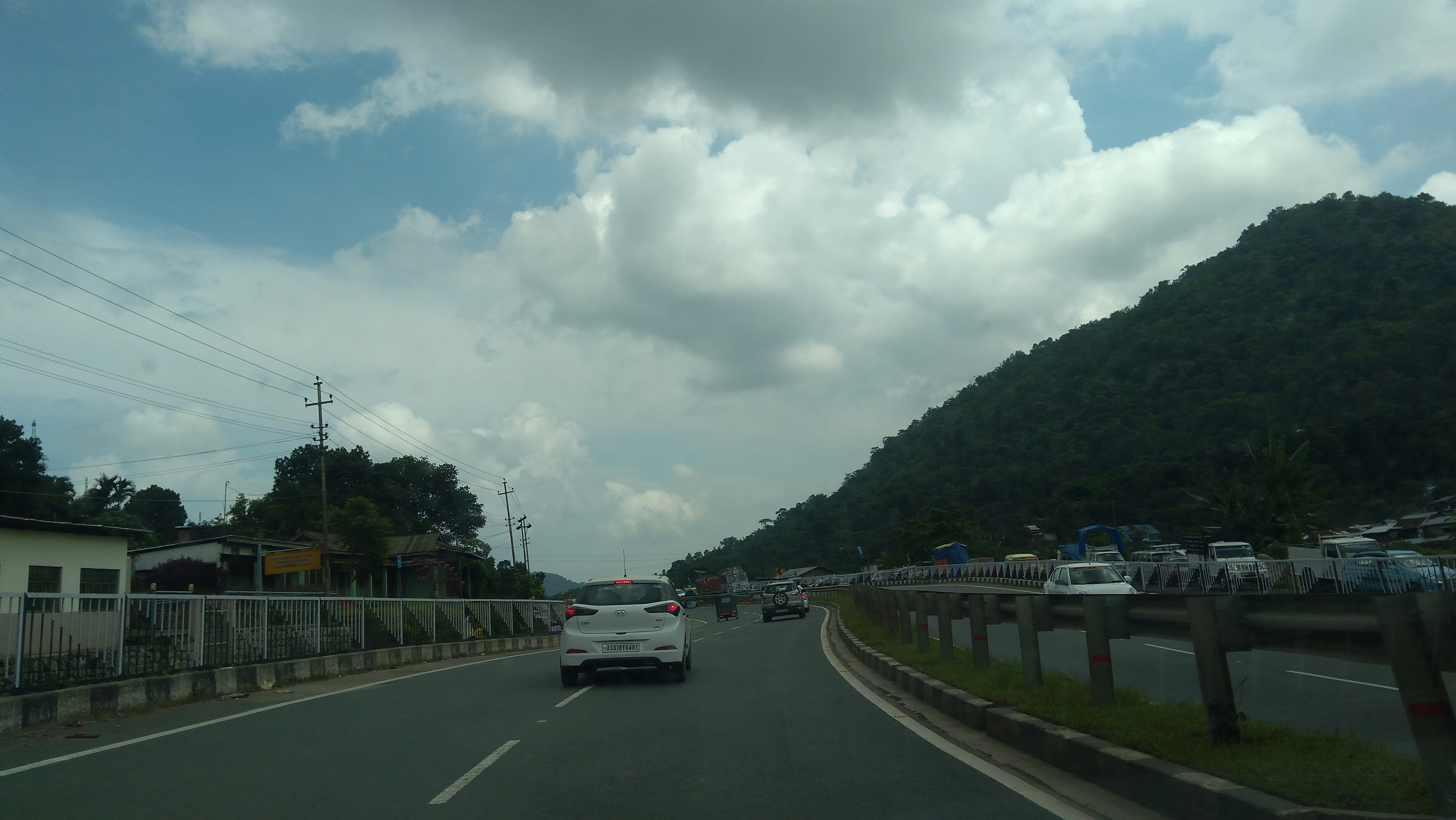 Nongpoh, Meghalaya